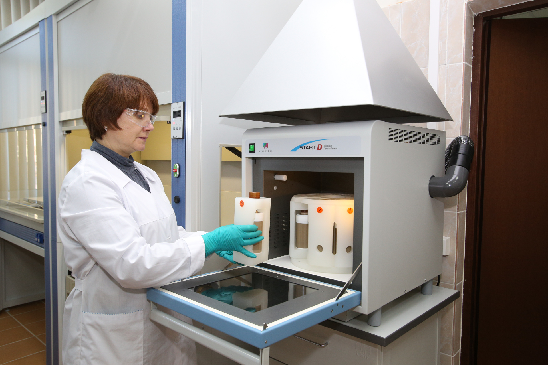 Лаборатория физико-химических методов исследования Технического университета УГМК